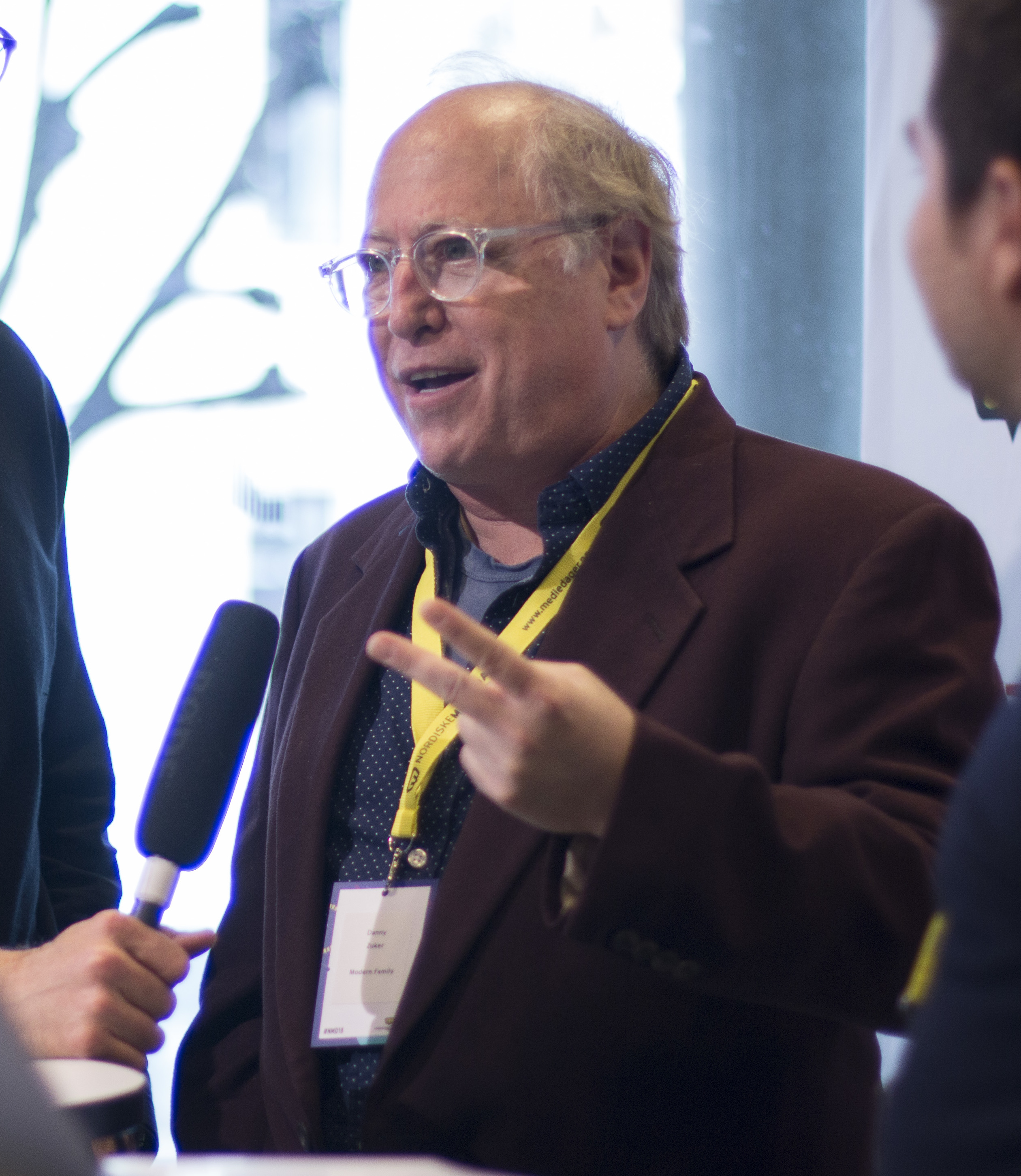 Danny Zuker